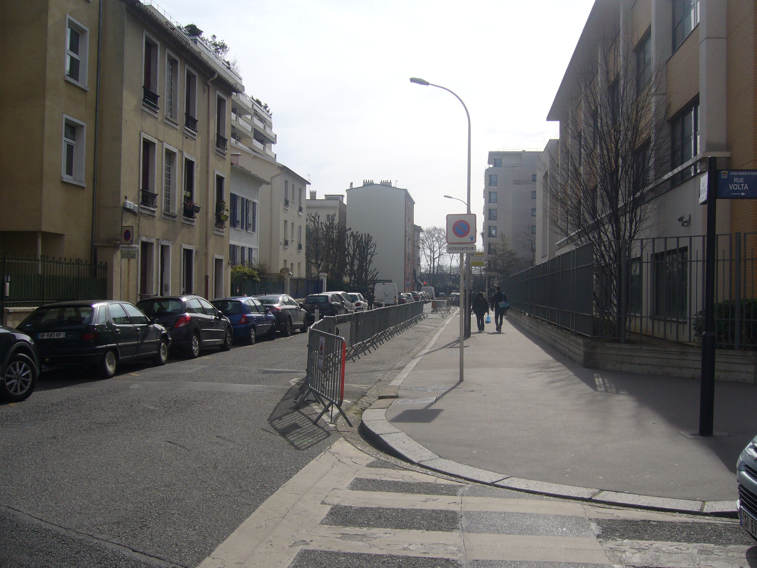 Rue Edith Cavell, Courbevoie, France